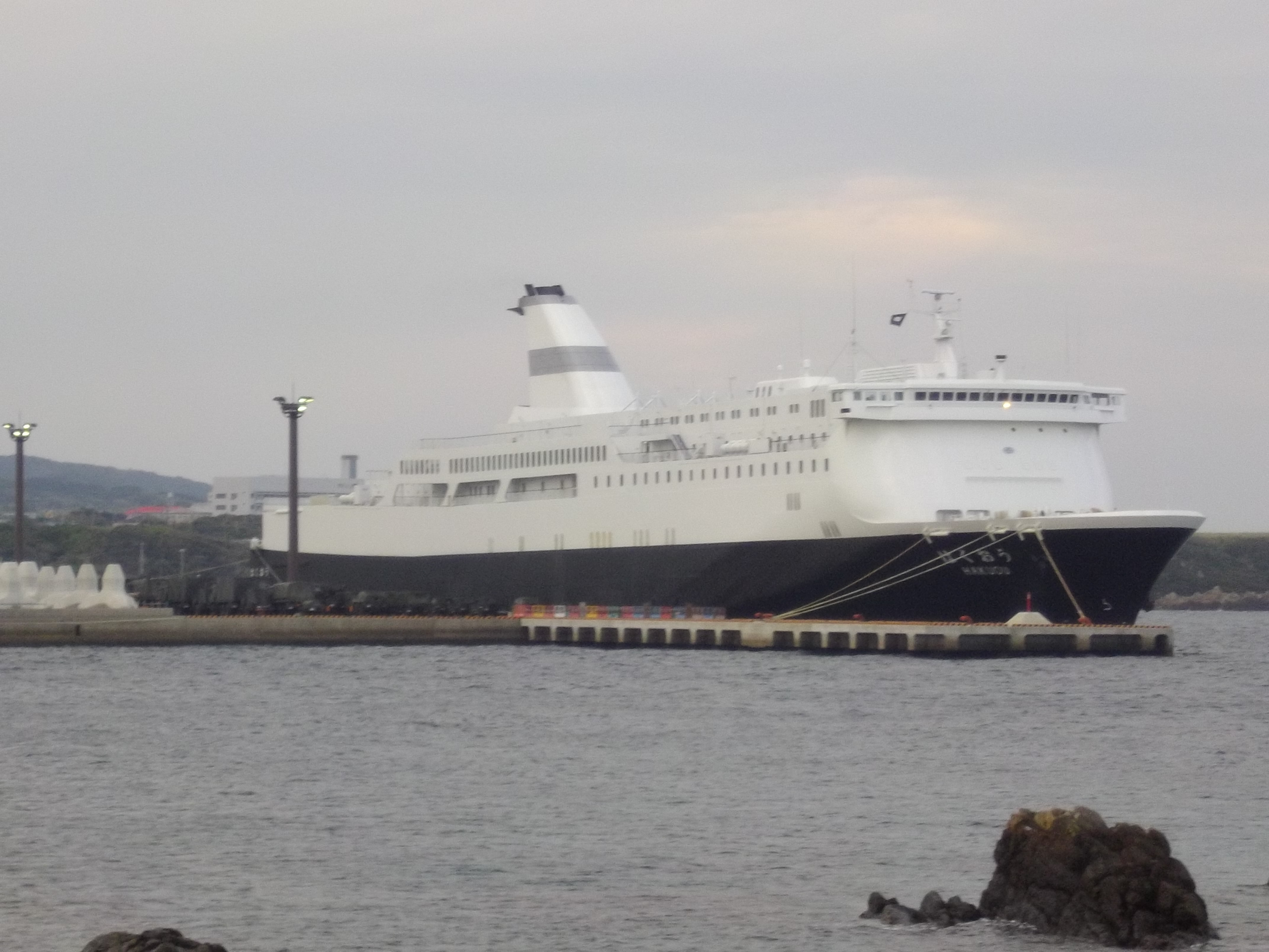 西之表港はくおう